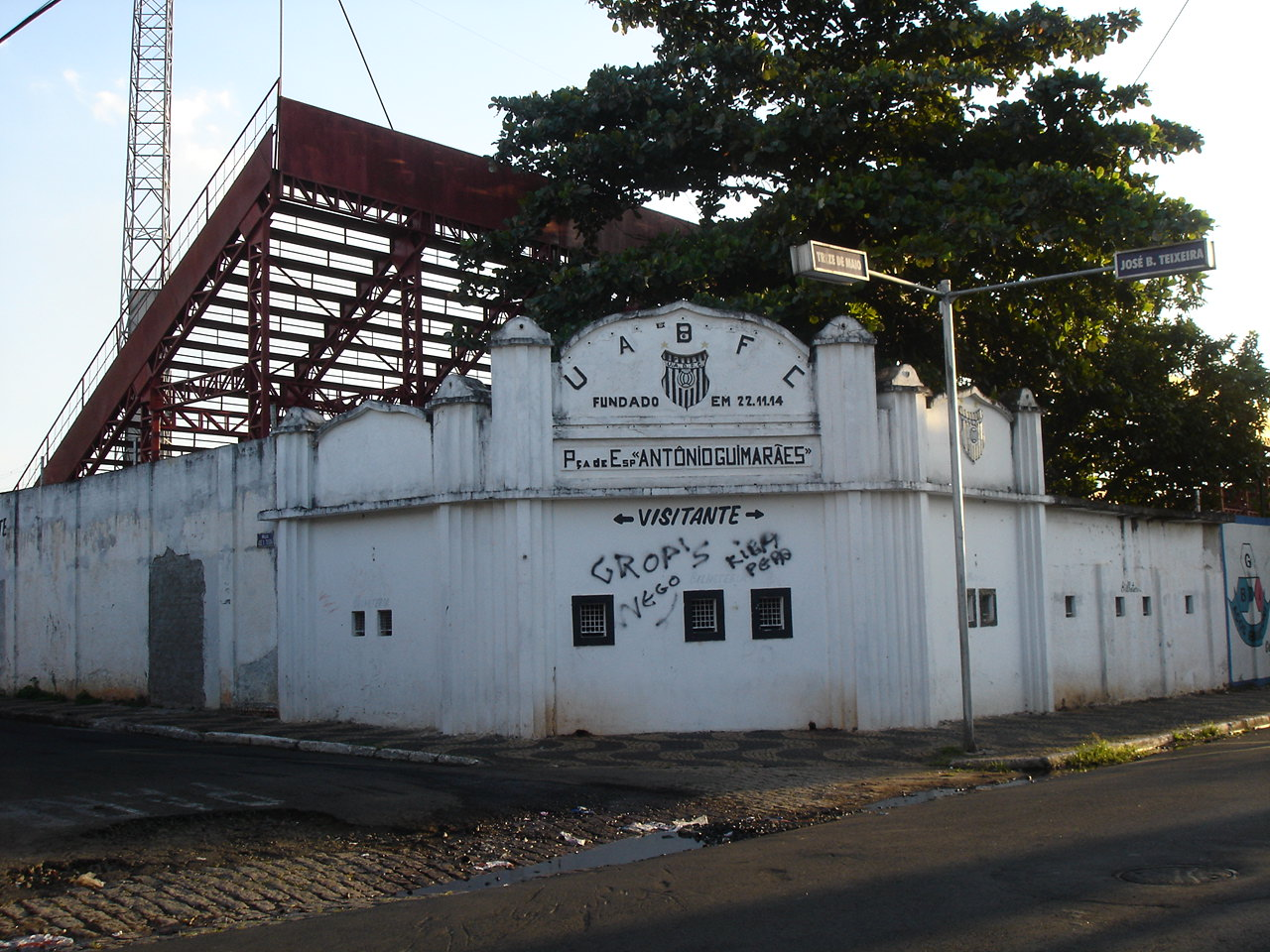 Estádio do União Agrícola Barbarense Futebol Clube Brazilian União Barbarense`s soccer stadium author: Daniel Candido